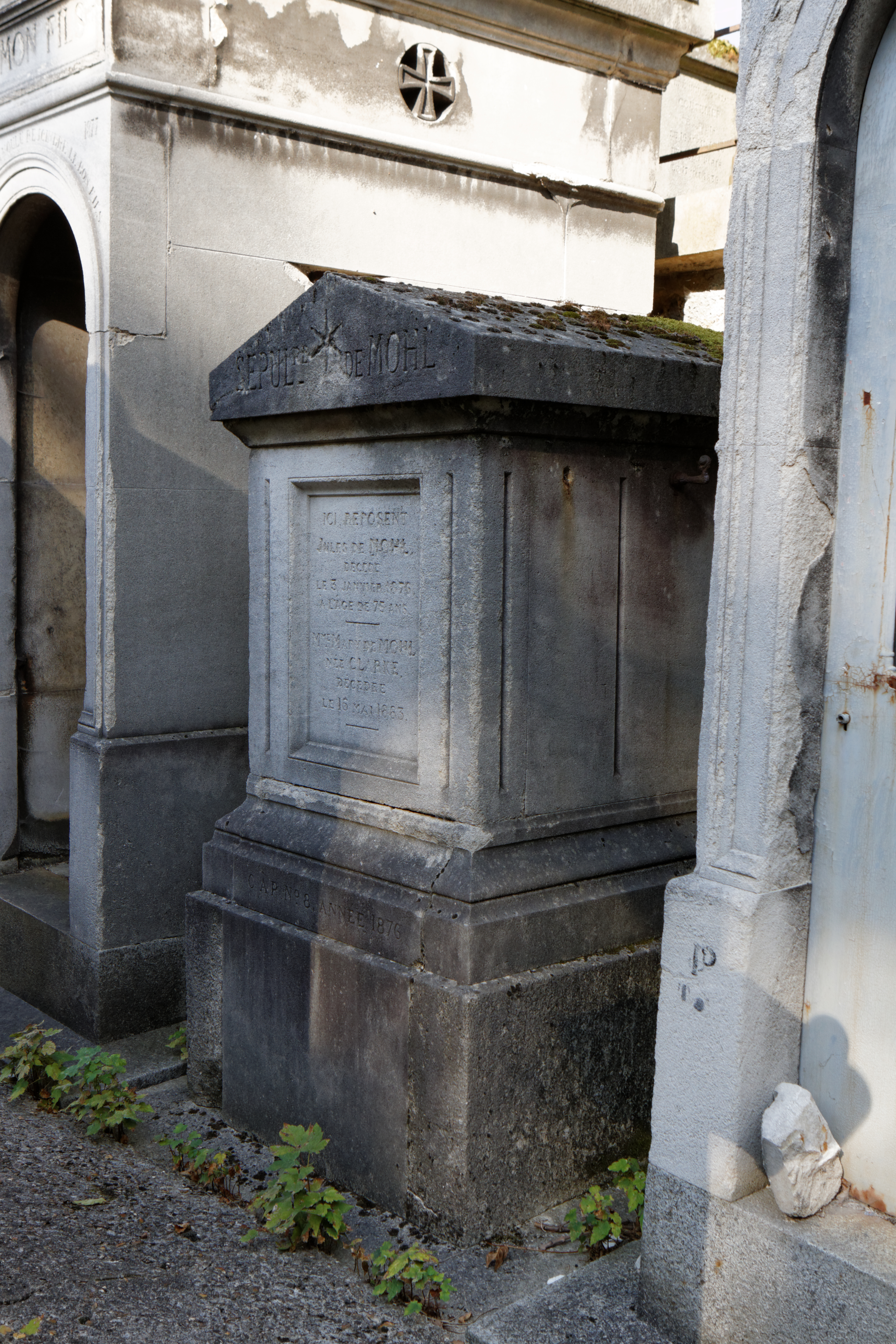 Sépulture de Jules Mohl (1800-1876), orientaliste qui marqua son époque dans le domaine de l'iranologie.